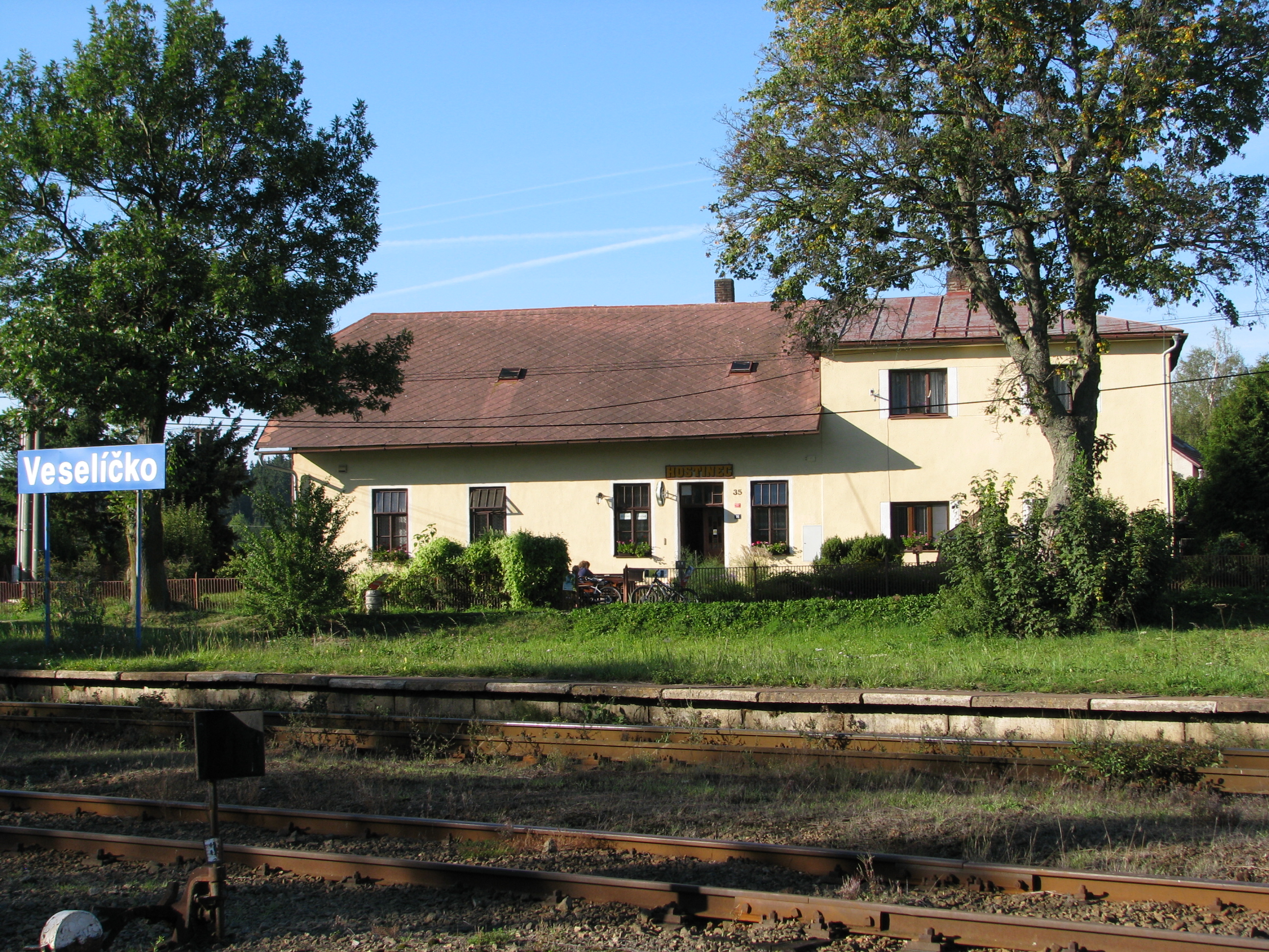 Veselíčko (Žďár nad Sázavou) - vlaková zastávka, hostinec